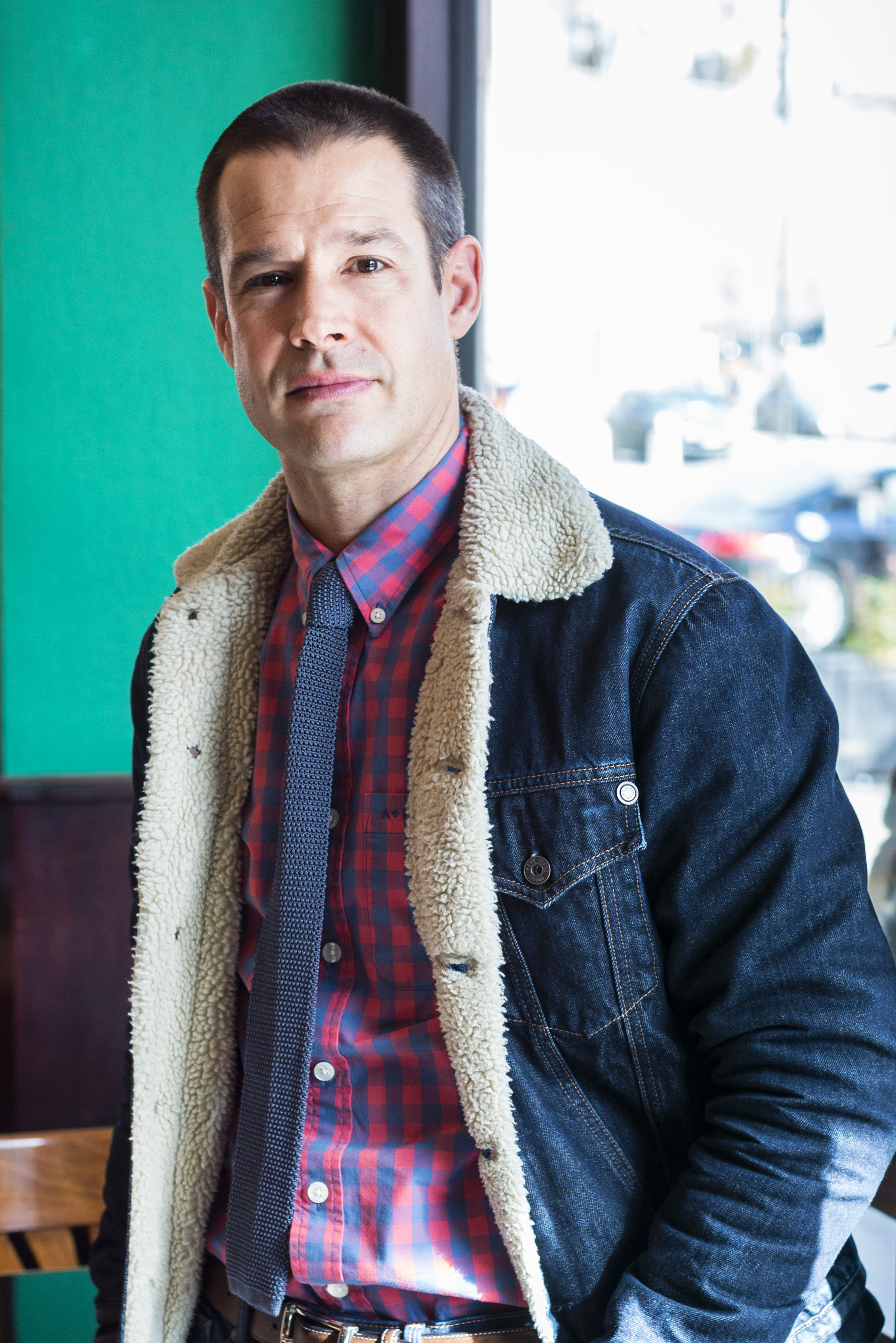 Crédit Photo @Magali Dougados